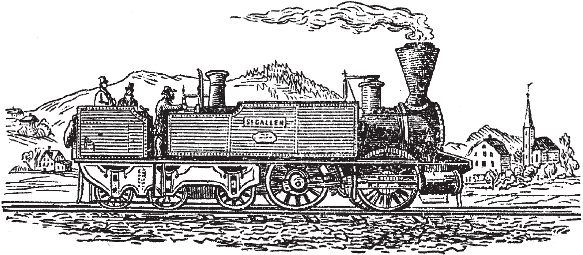 Zeitgenössische und wirklichkeitstreue Darstellung der ersten Lokomotive Ec 2/5 Nr. 1 der St. Gallisch-Appenzellischen Eisenbahn